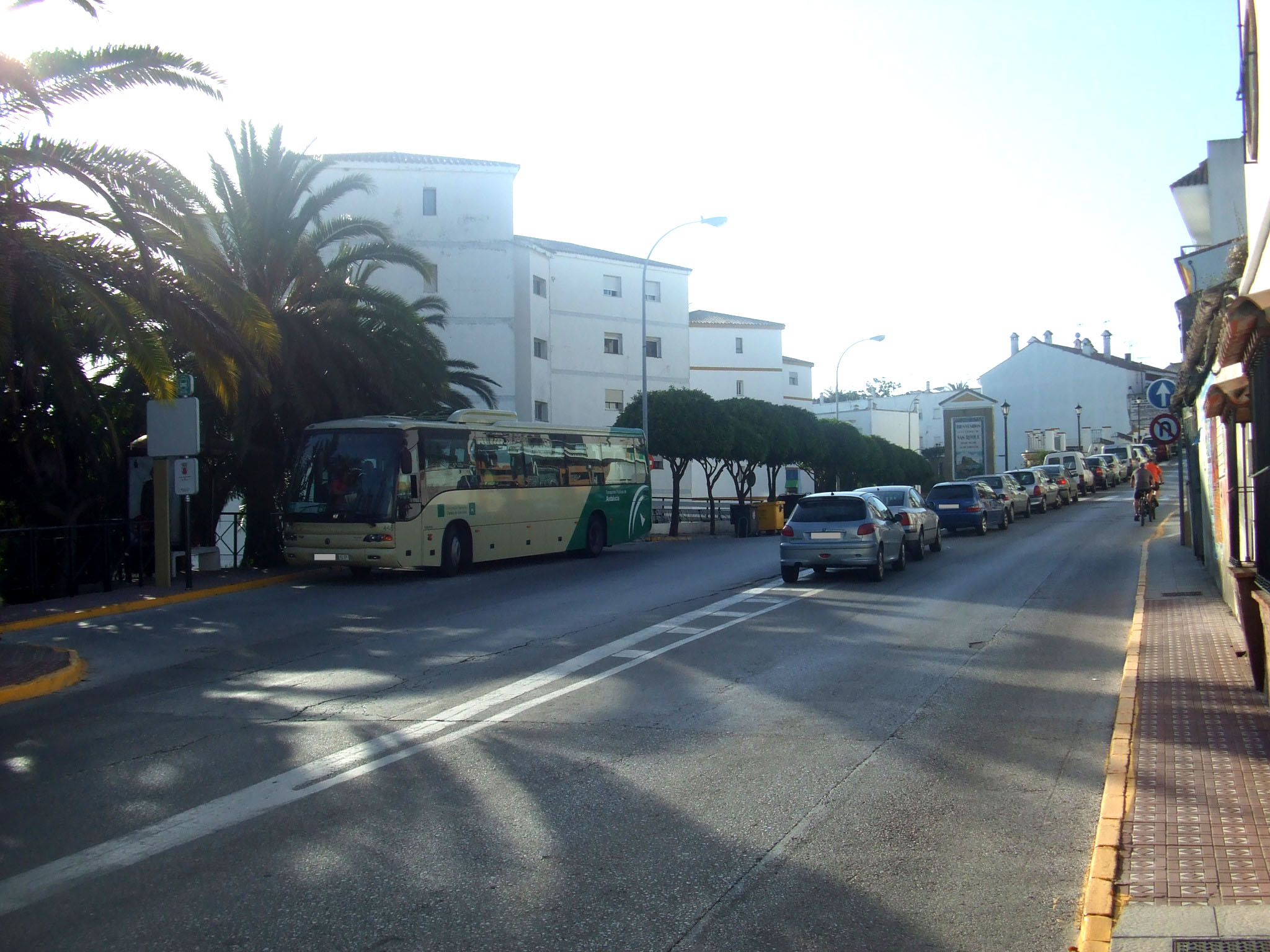 Urbanización El Calvario de San Roque. Calle Batallón Cazadores de Tarifa. Autobús del CTMCG en la parada de El Calvario.